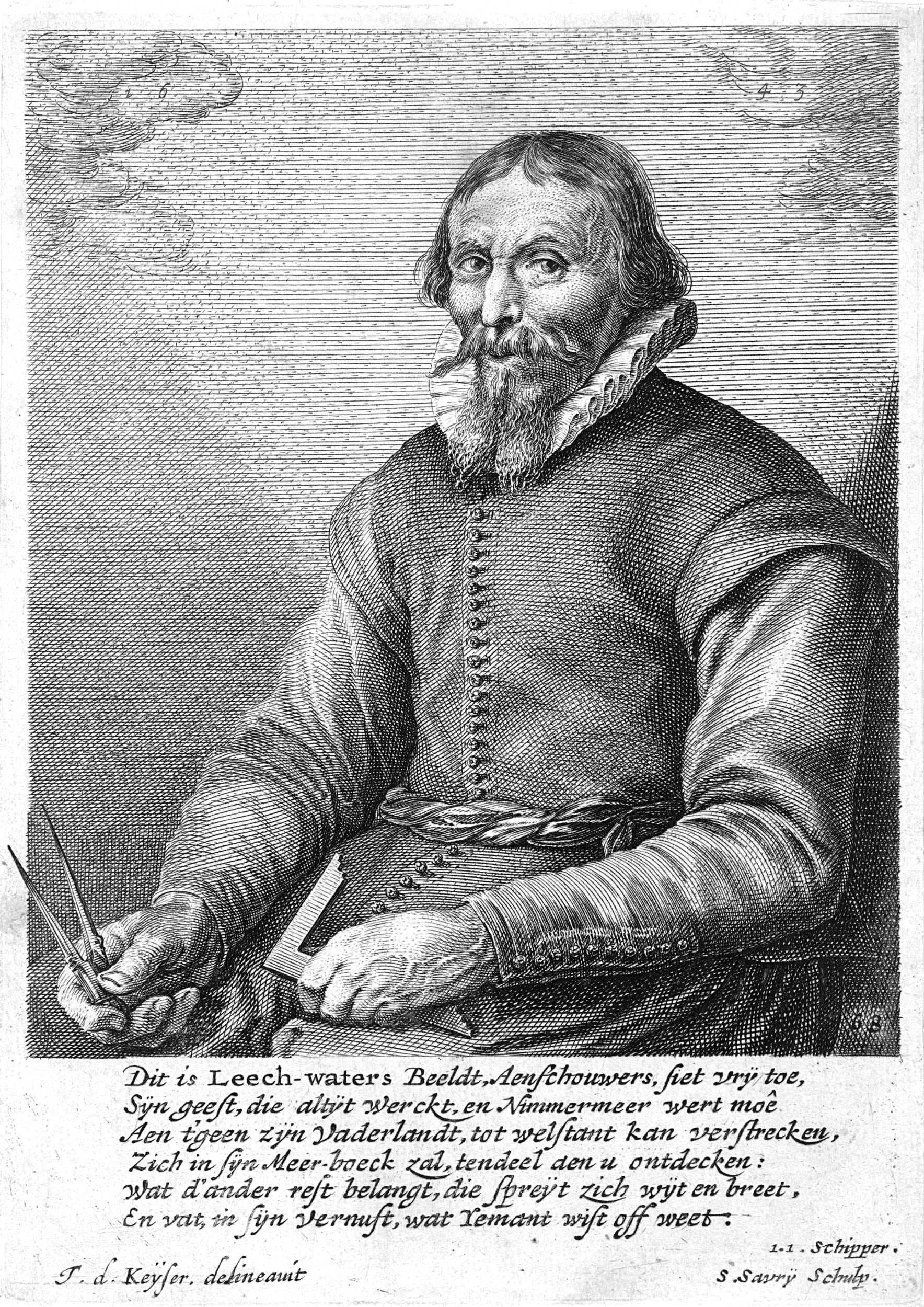 Gravure van Leeghwater in zijn Haarlemmermeerboeck Uit 1654